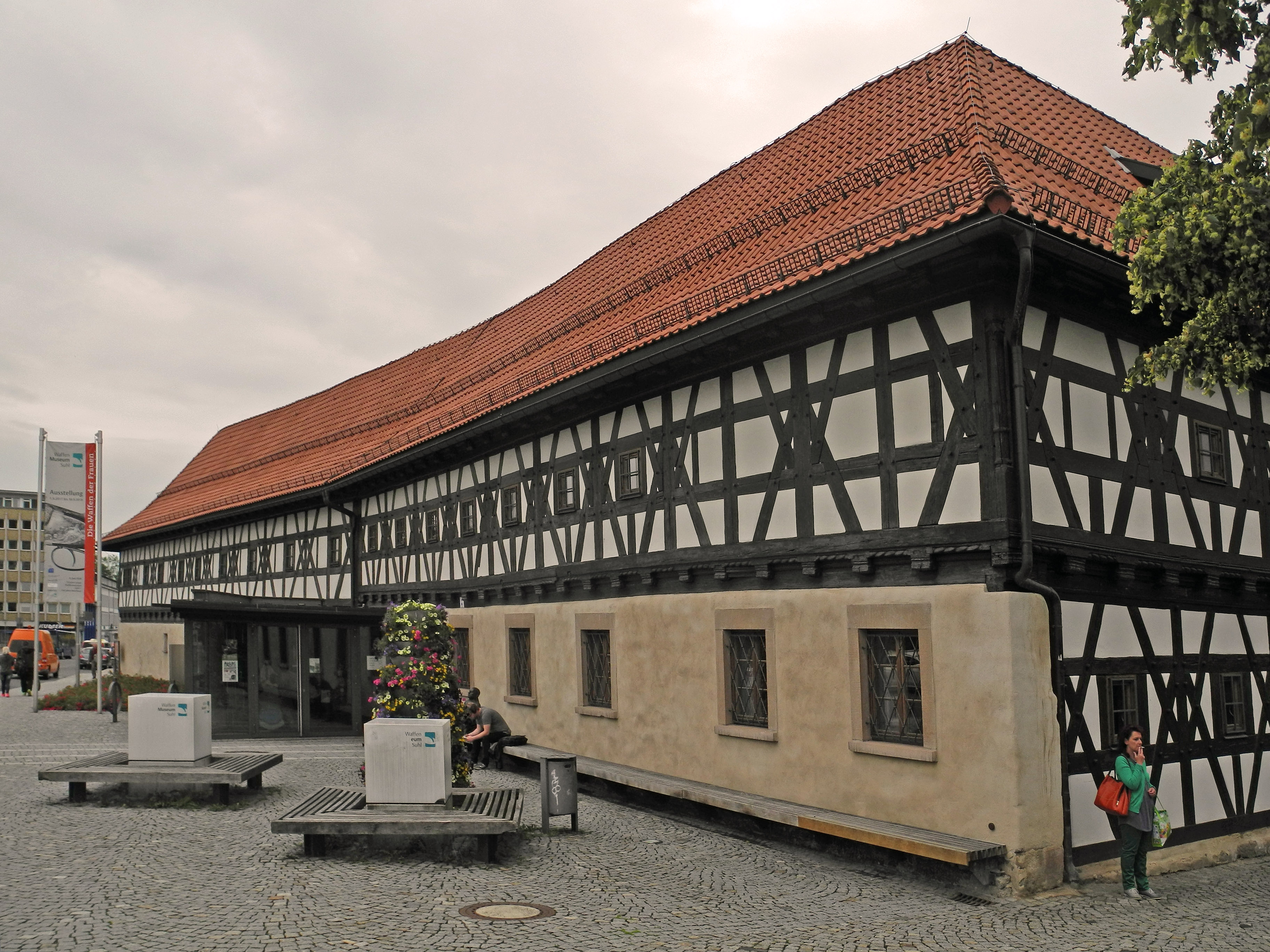 Ehem. Malzhaus in Suhl, jetzt Waffenmuseum